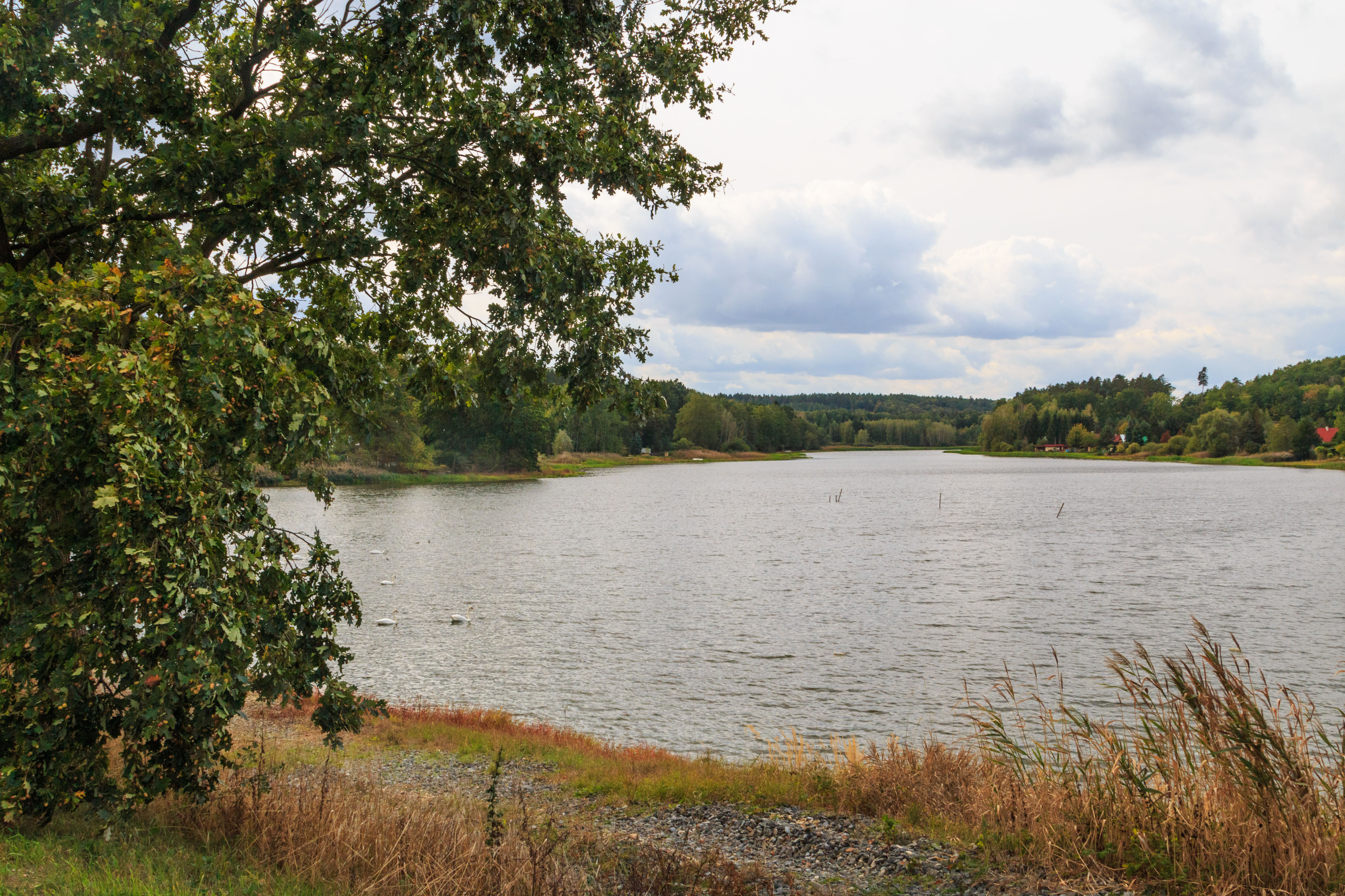 Novoveský rybník Project: Vodstvo.